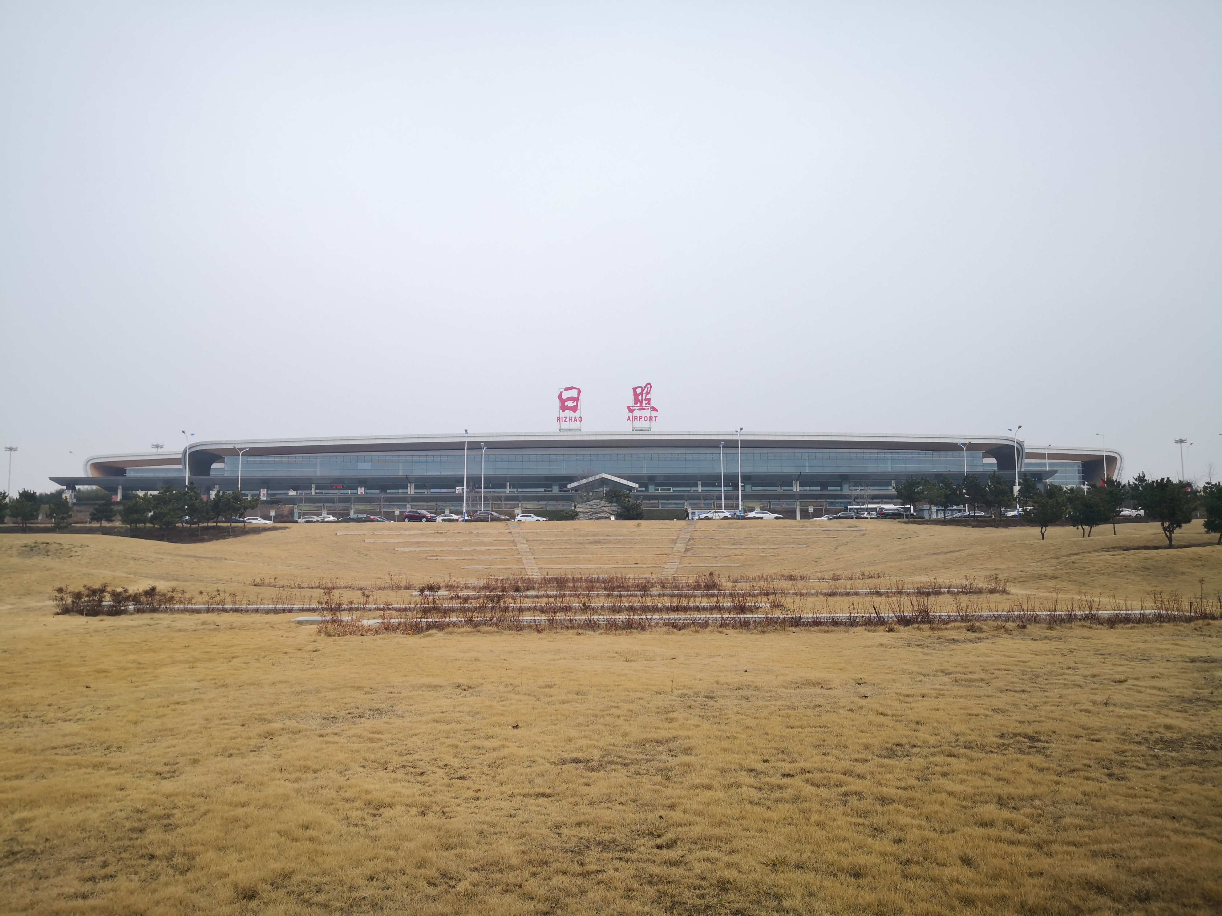 日照山字河机场航站楼